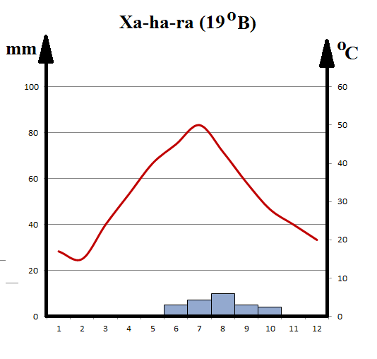 Biểu đồ NĐ, LM ở Xa-ha-ra